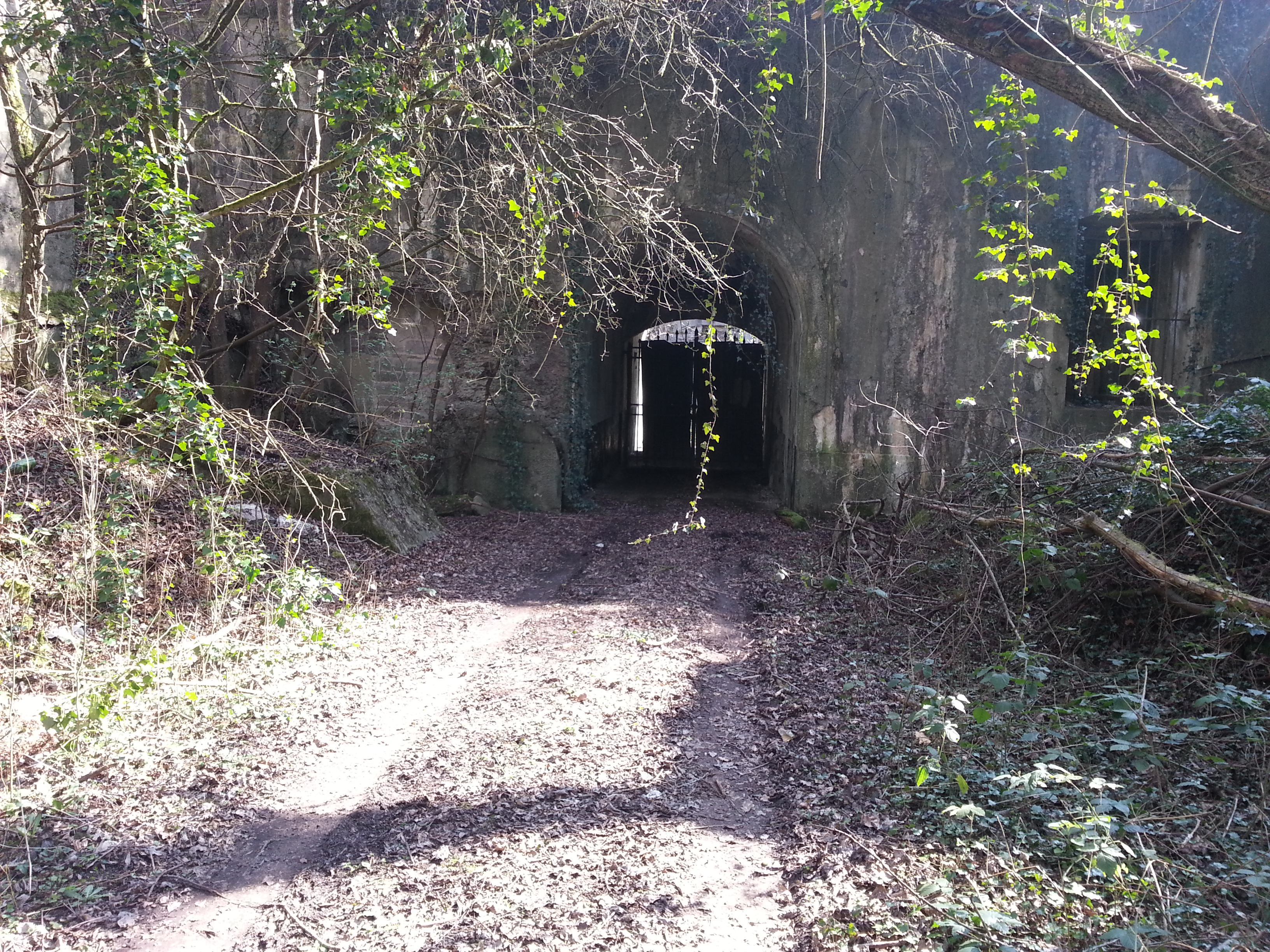 L'entrée principale du fort d'Andoy situé au Sud-Est de Namur